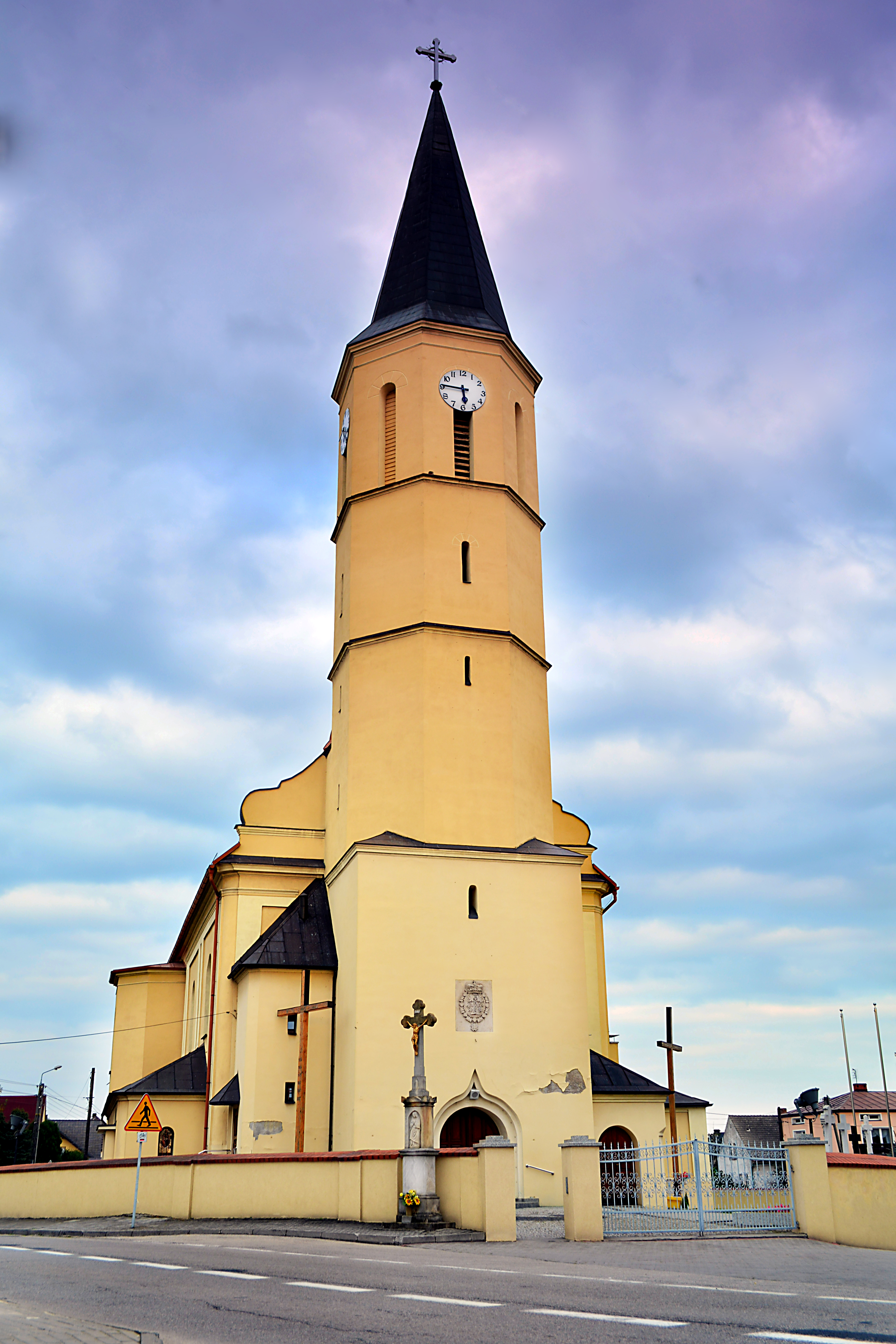 Krzyżanowice, kościół par. p.w. św. Anny, 1791-1793, 1848